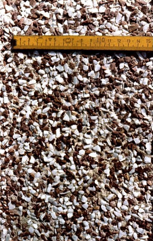 Factual corrections and alternative descriptions are encouraged separately from the original description. Additionally errors can be reported at this page to inform the Bundesarchiv. Original historic description: Körnig gemischter und entstaubter Splitt Splitt körnig gemischt und entstaubt auf Papier geklebt (Dextrin). Die Lagen wurden unten eingebracht und darauf vermörtelt [Körnig gemischter und entstaubter Splitt auf Papier]